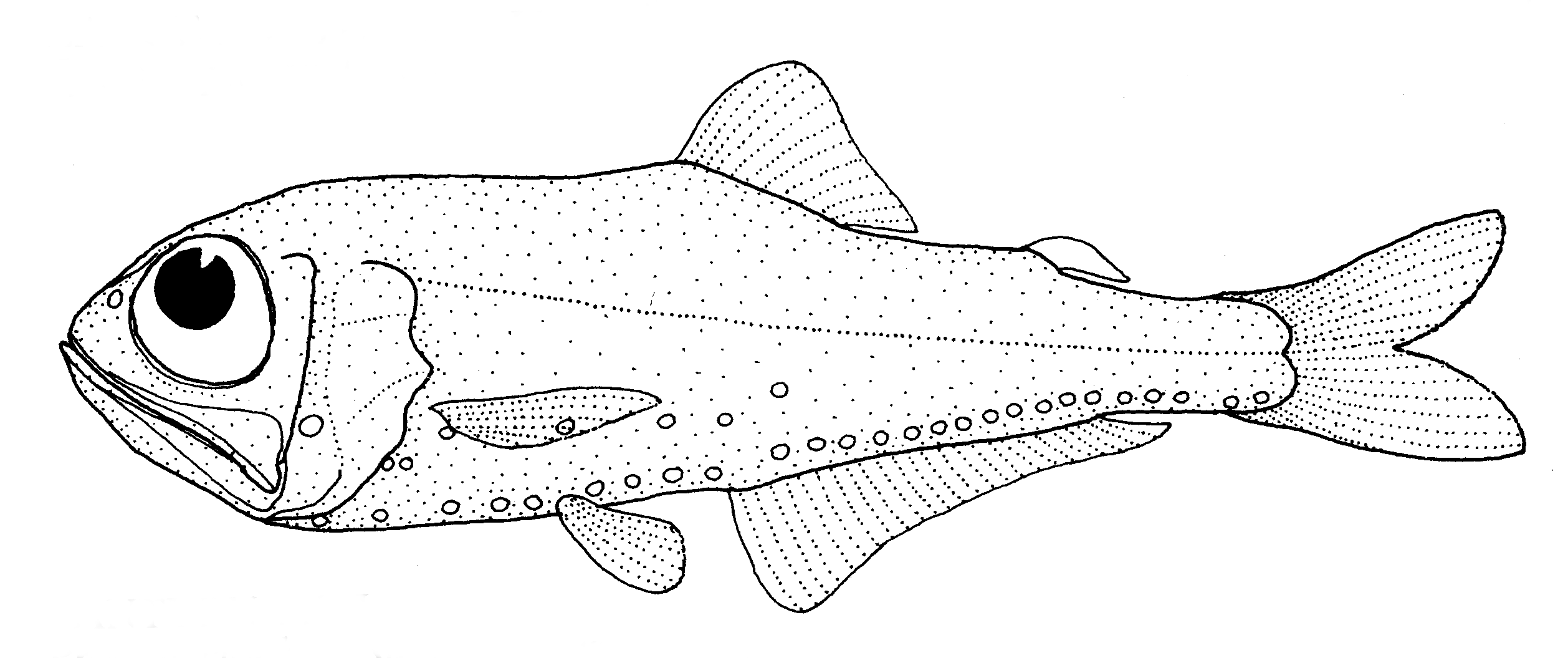 Protomyctophum subparallelum (no common name)